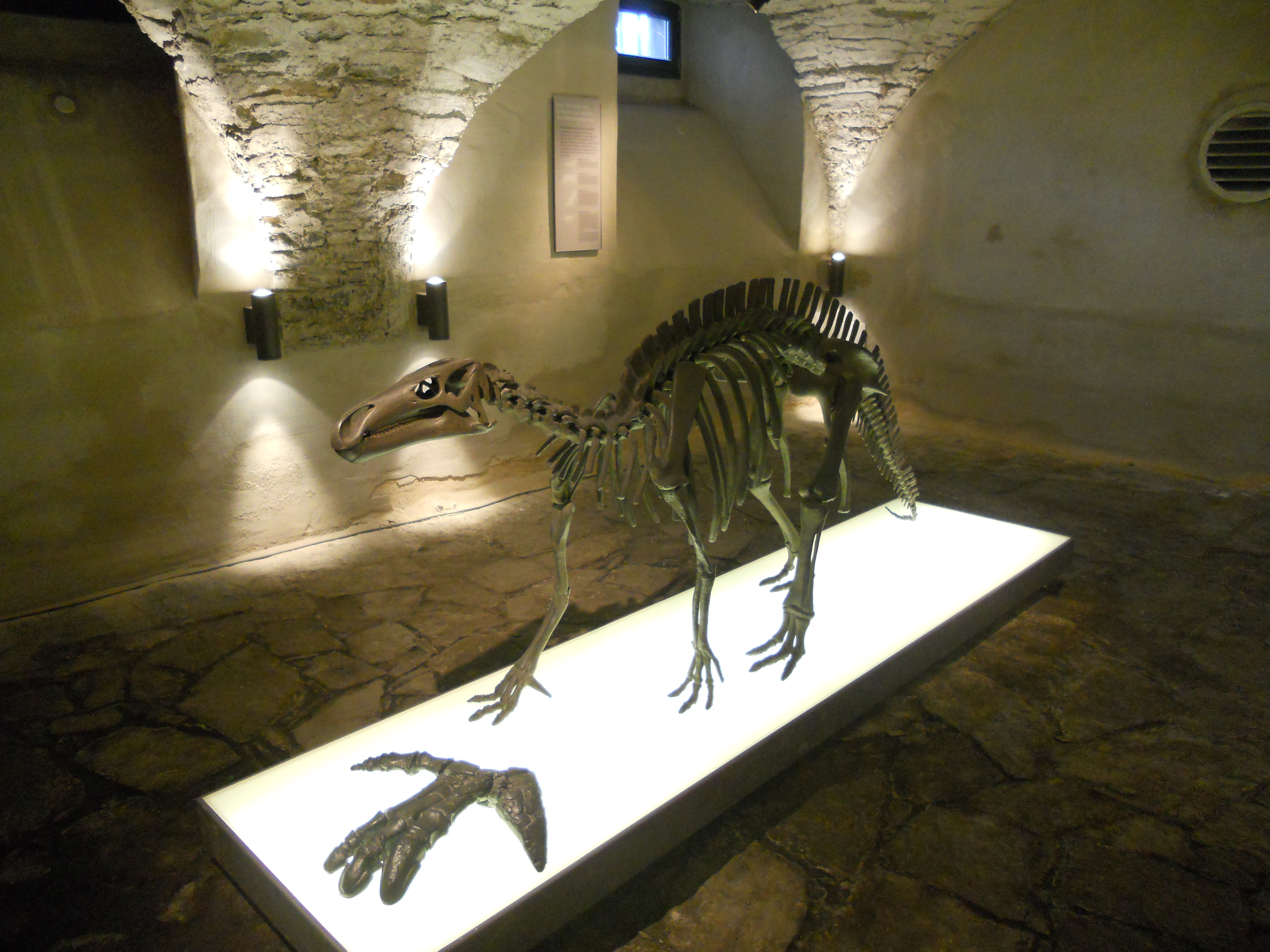 Brilon, Haus Hövener, Skelettnachbildung eines Sauriers bei Nehden